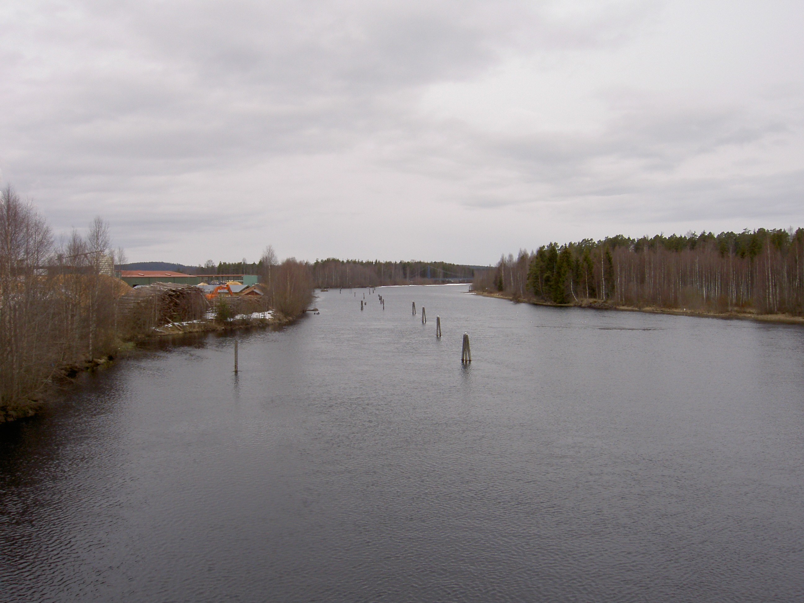 Vanån, biflöde till/tributary to Västerdaläven, Vansbro, Sverige/Sweden